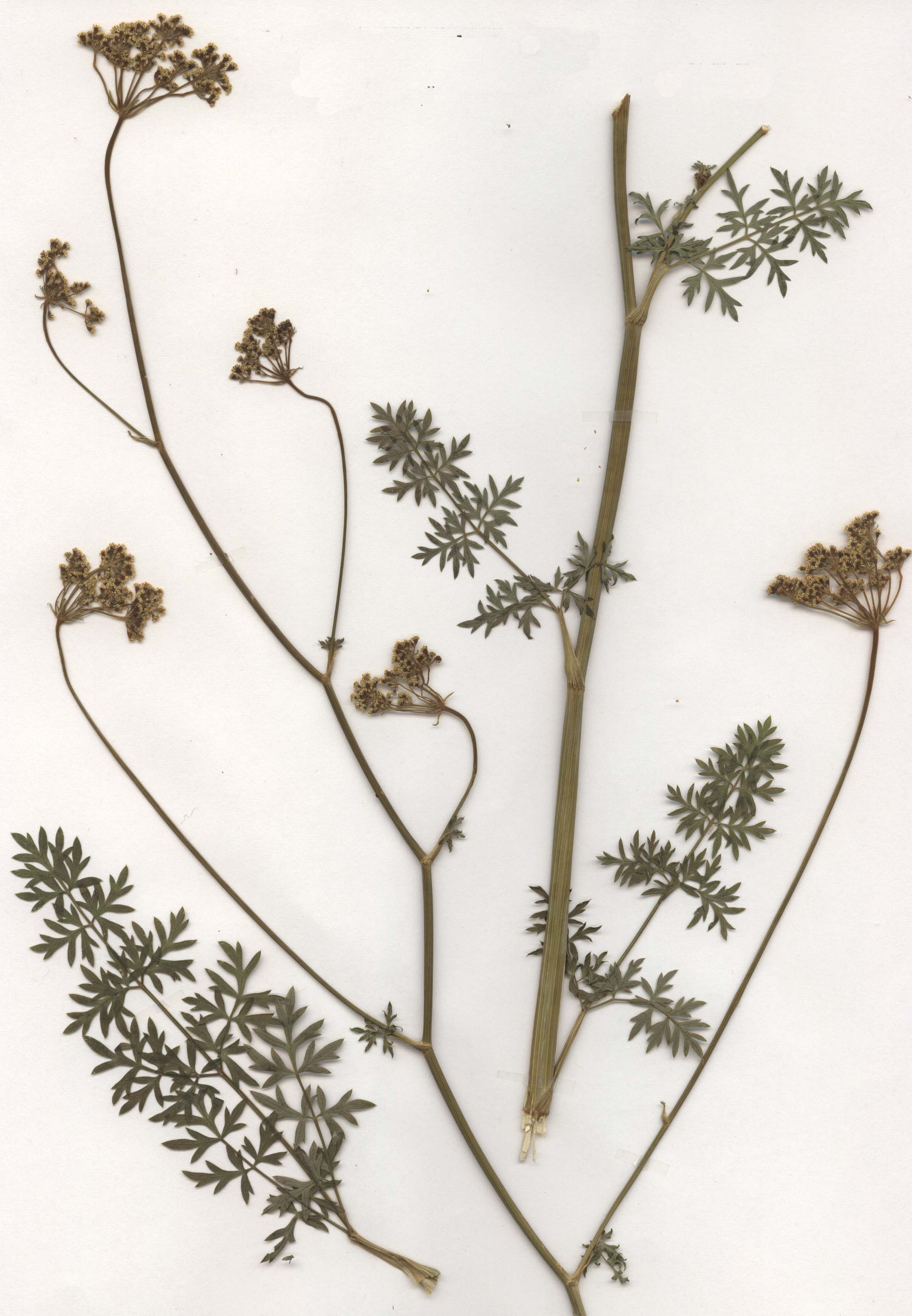 Peucedanum alsaticum, eigener Herbarbeleg von 1982, Unterfranken